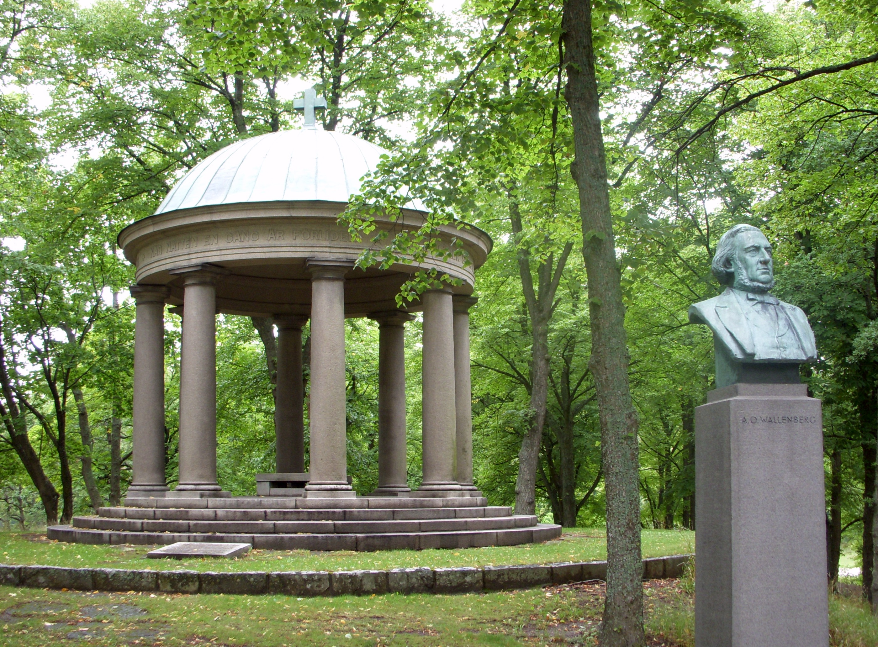 Wallenberg-mausoleum vid Malmvik i Ekerö kommun